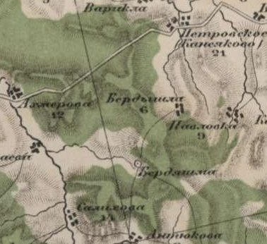 Ахмеровский и Барский лес. Фрагмент Специальной карты Европейской России. Масштаб: 10 верст в дюйме (1 см-4200м, 1:420000).